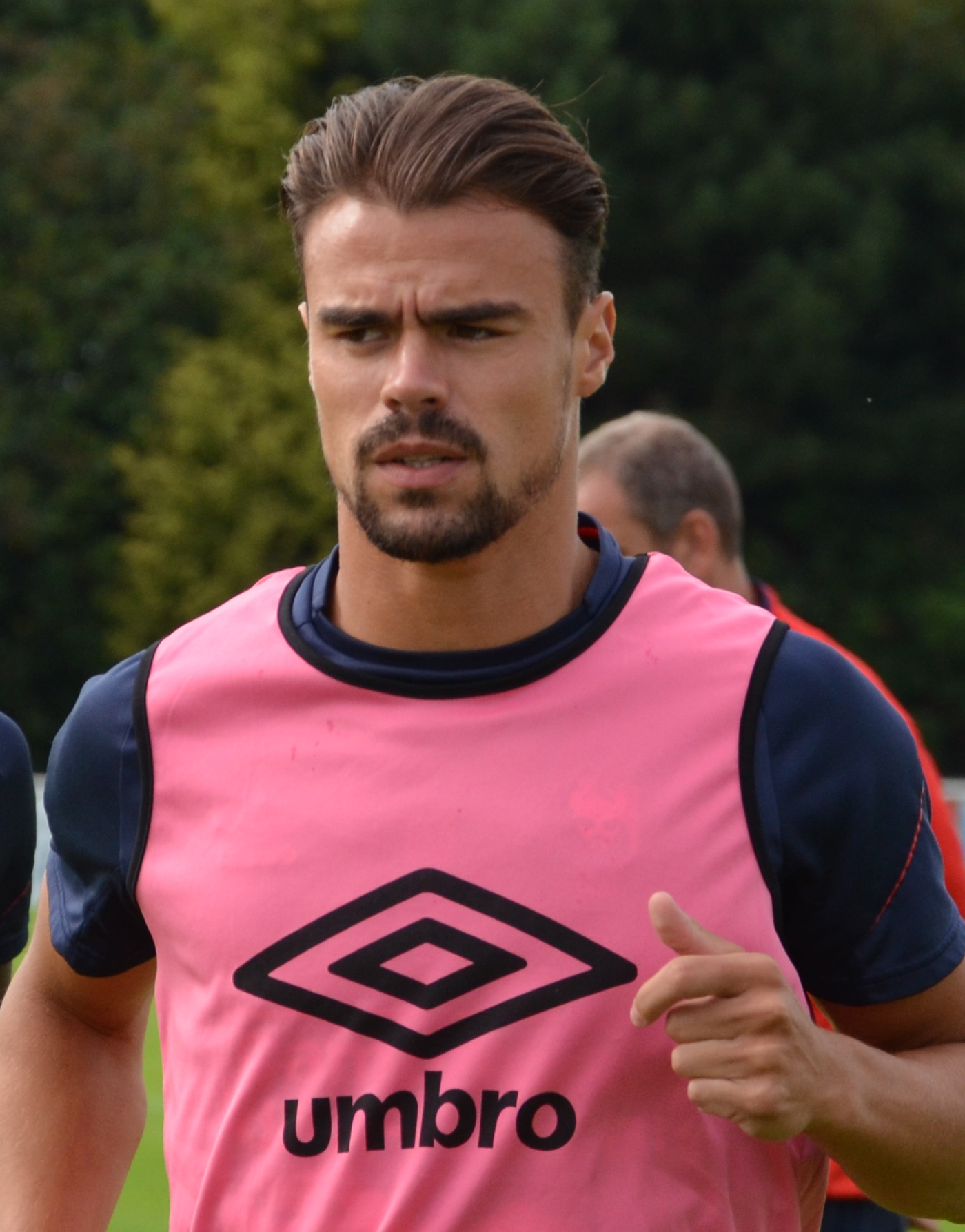 Photographie prise lors du match opposant le SM Caen à l'UNFP en match amical au stade Louis-Villemer de Saint-Lô le 30 juillet 2016. Ici, Damien Da Silva.